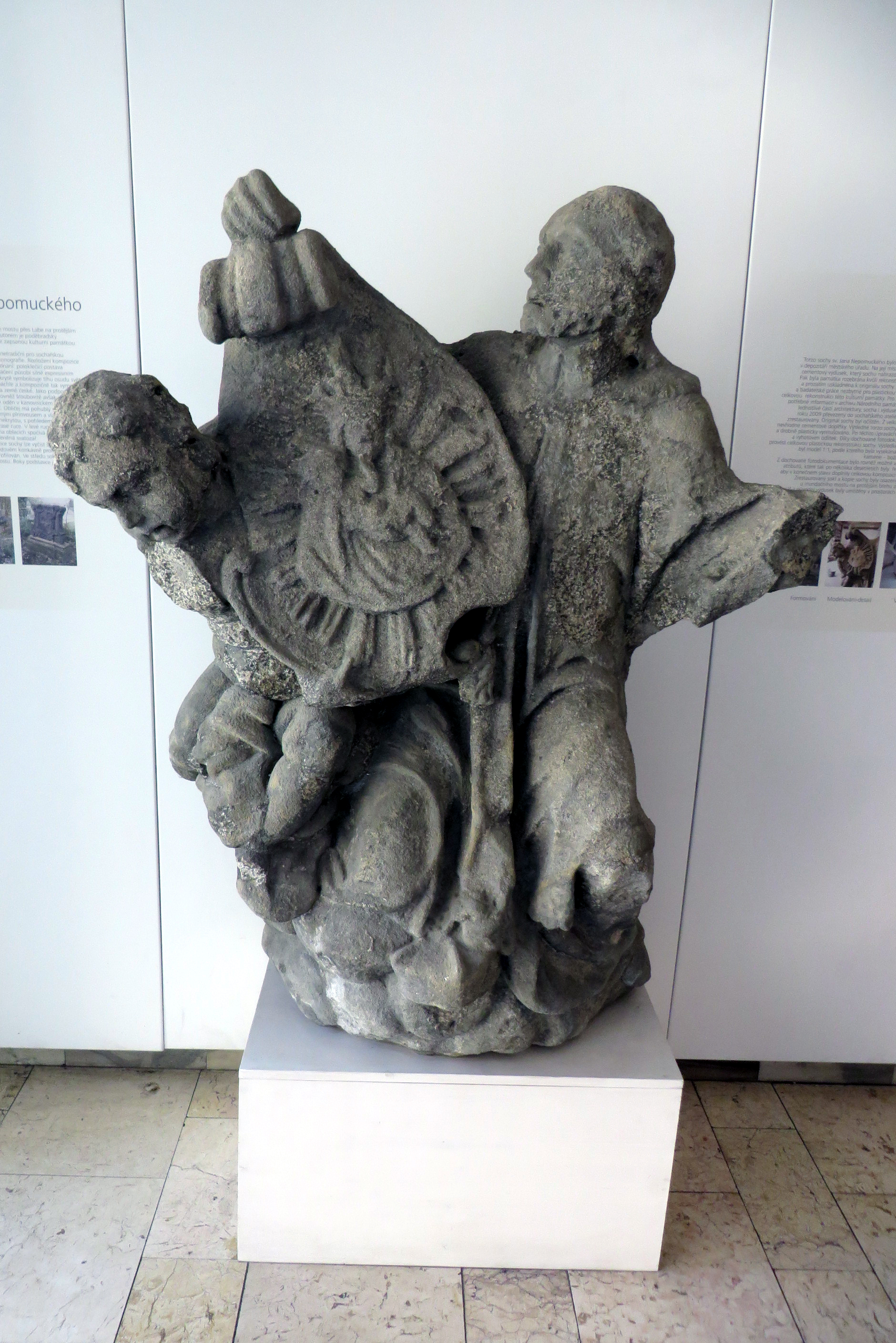 Originál sochy vystavený ve vchodu do radnice.